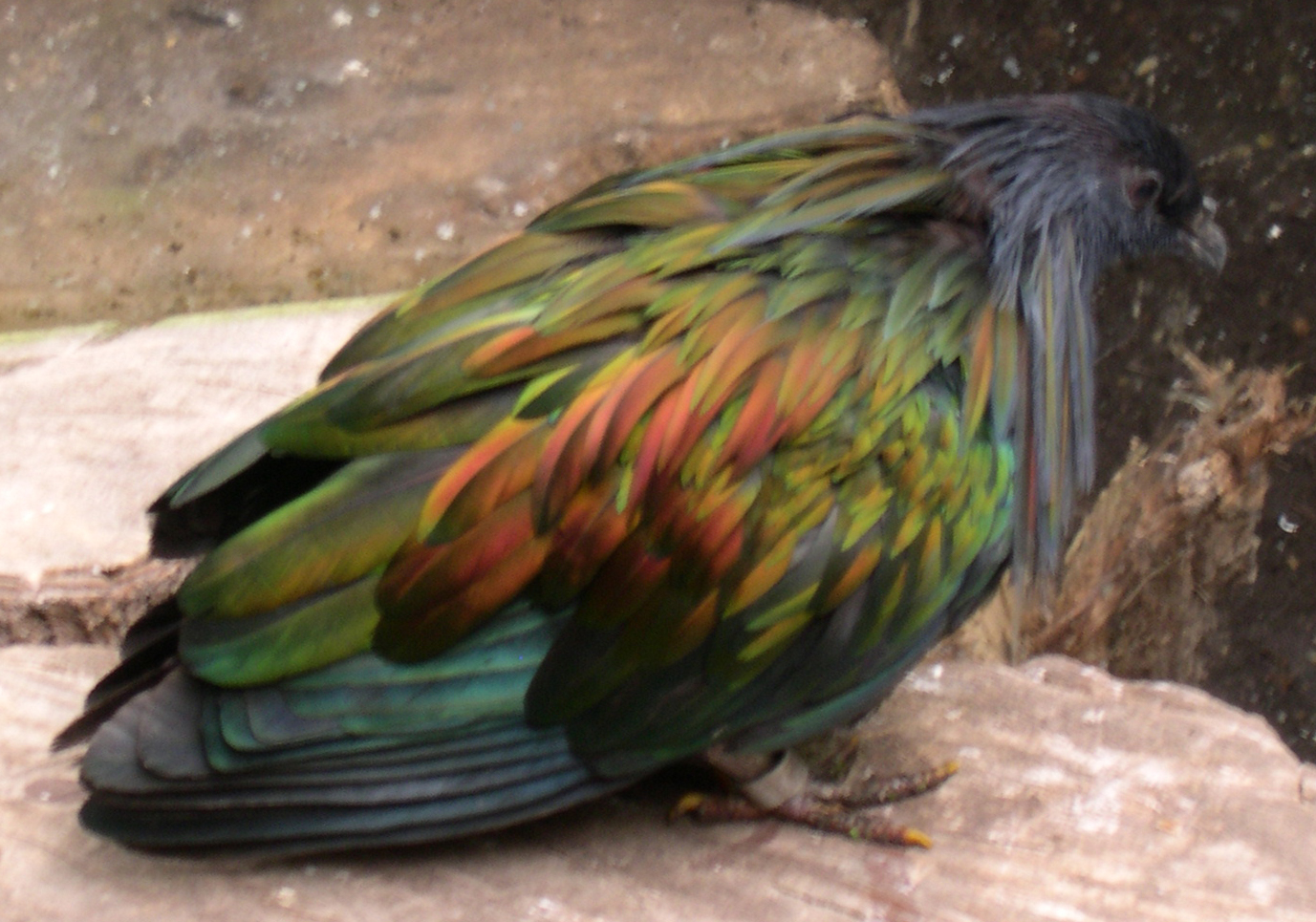 Een Manenduif (Caloenas nicobarica) in de Filipijnenhal van Avifauna Foto genomen door: Magalhães op 8 nov. 2005